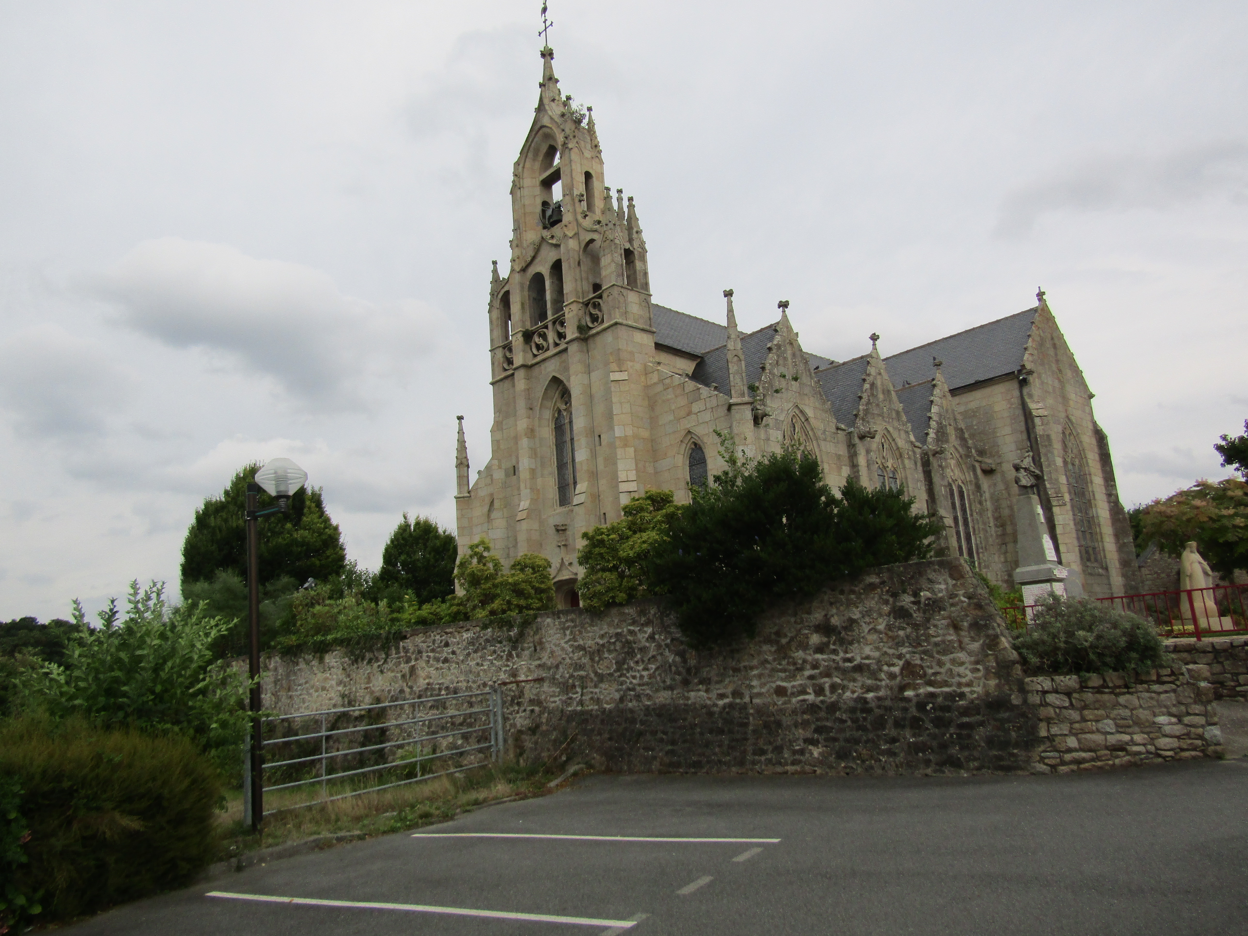 Église Notre-Dame de Saint-Agathon